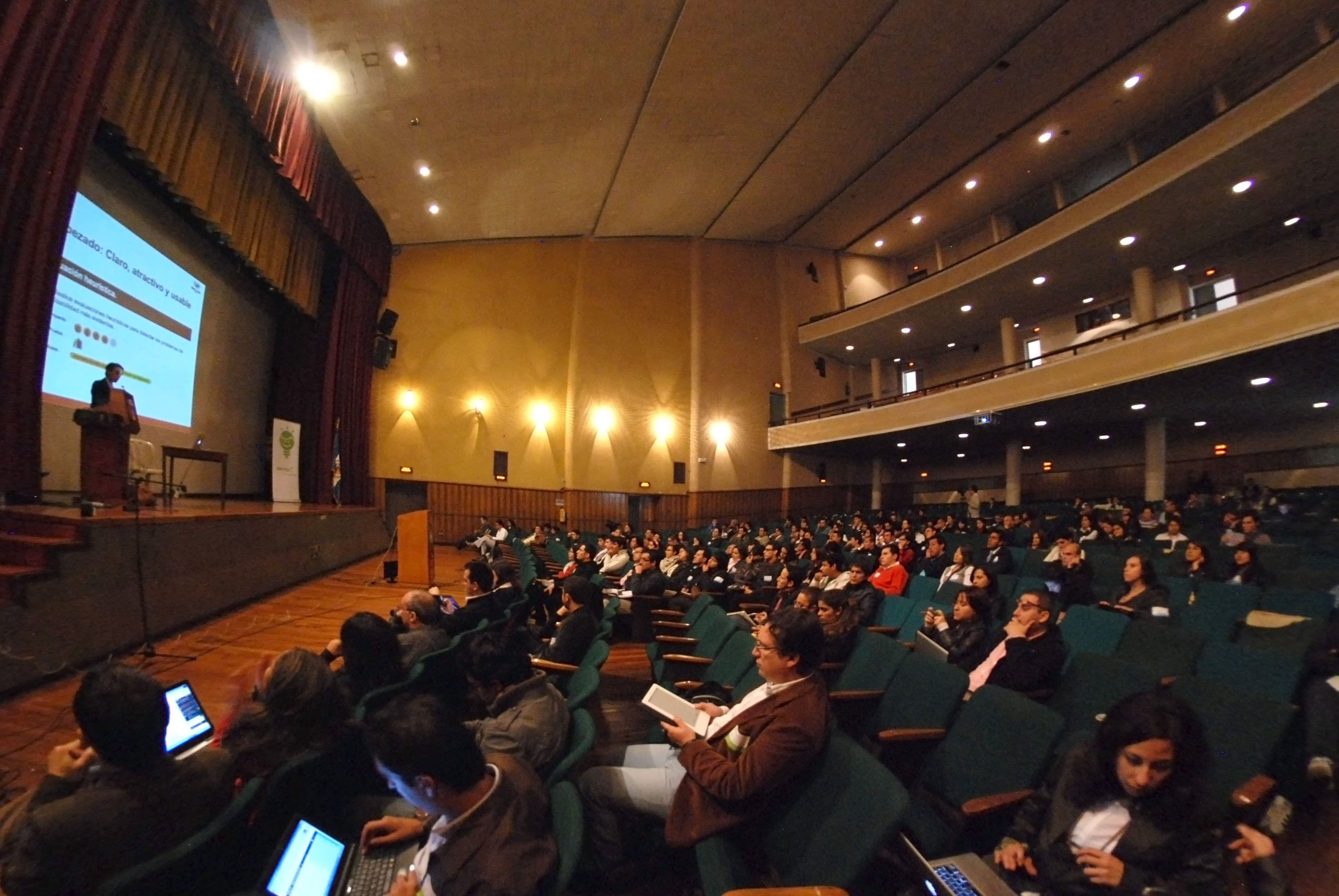 En tarima, Juan Saab, presentando el borrador de las Directrices de Usabilidad de Gobierno en línea